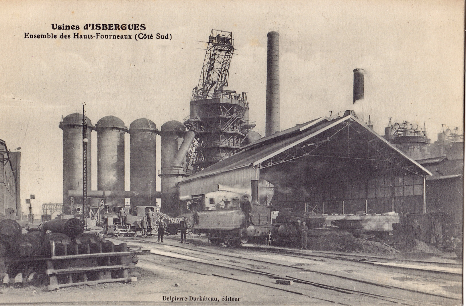 Carte postale ancienne éditée par Delpierre-Duchâteau : Usines d'ISBERGUES - Ensemble des Hauts-Fournaux (côté sud)